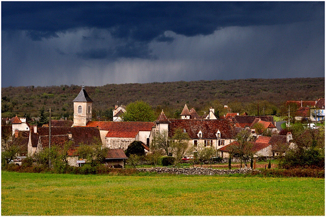 Vue sous l'orage